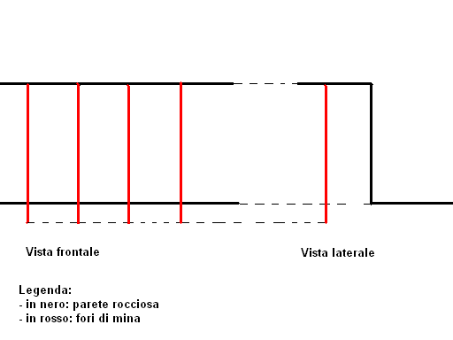 Schema di volata frontale per abbattimento di parete rettilinea